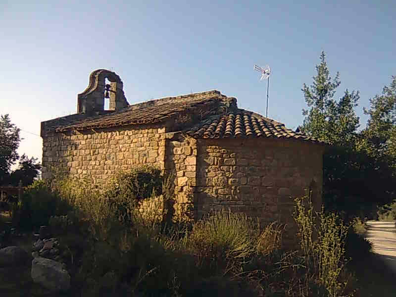 Iglesia de Sant Bartolomeu de Cabanyes perteneciente al término municipal de Orrius de la comarca del Maresme en Cataluña (Spain)